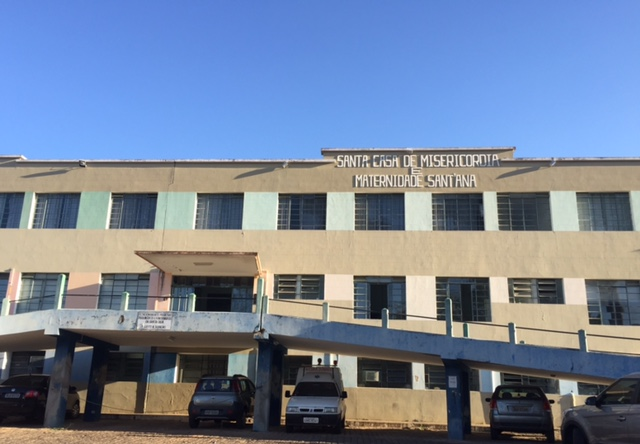 Fachada do prédio da Santa Casa de Misericórdia e Maternidade Santana.